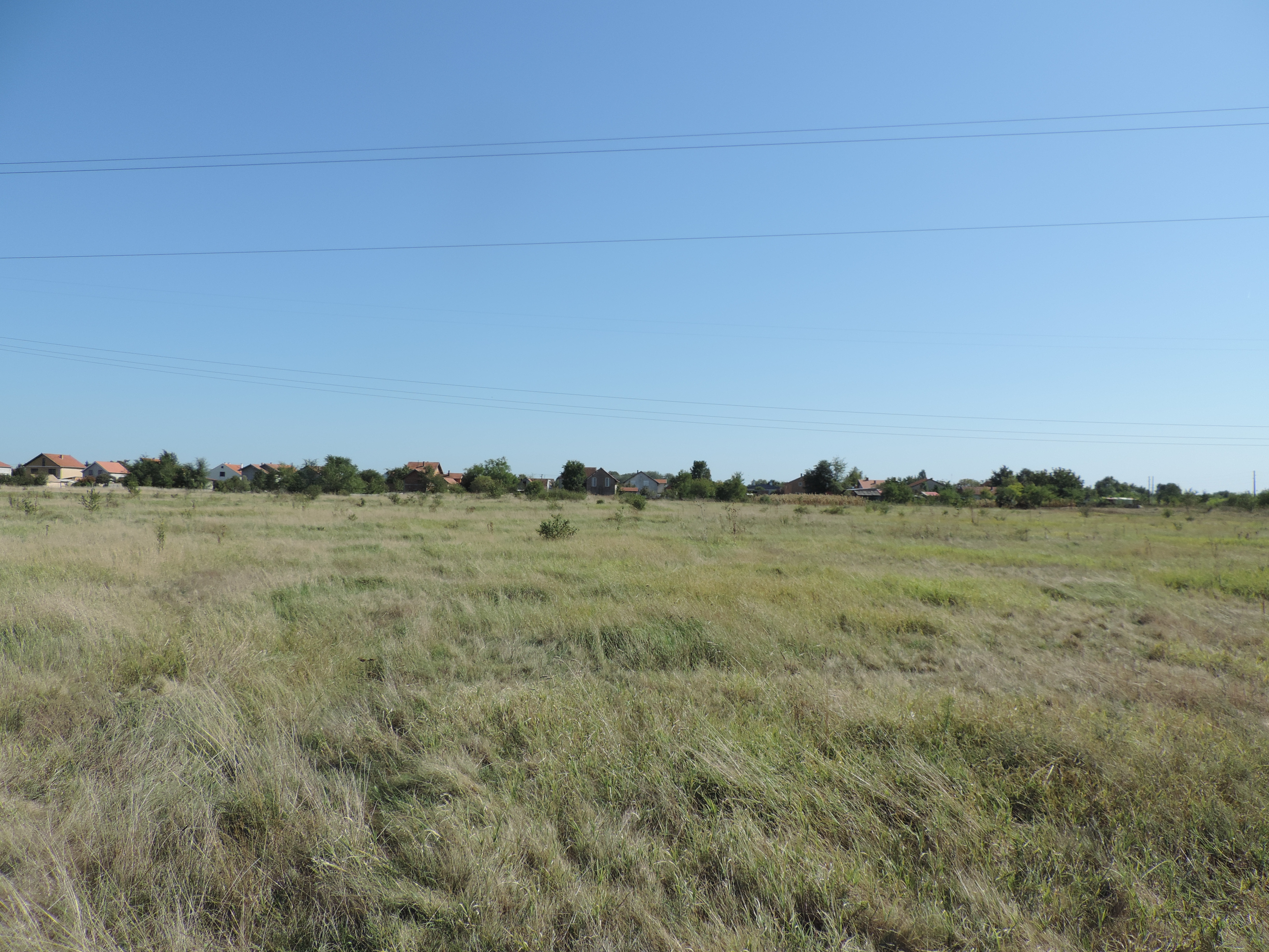 Slatina u okolini sela Vlajkovac.